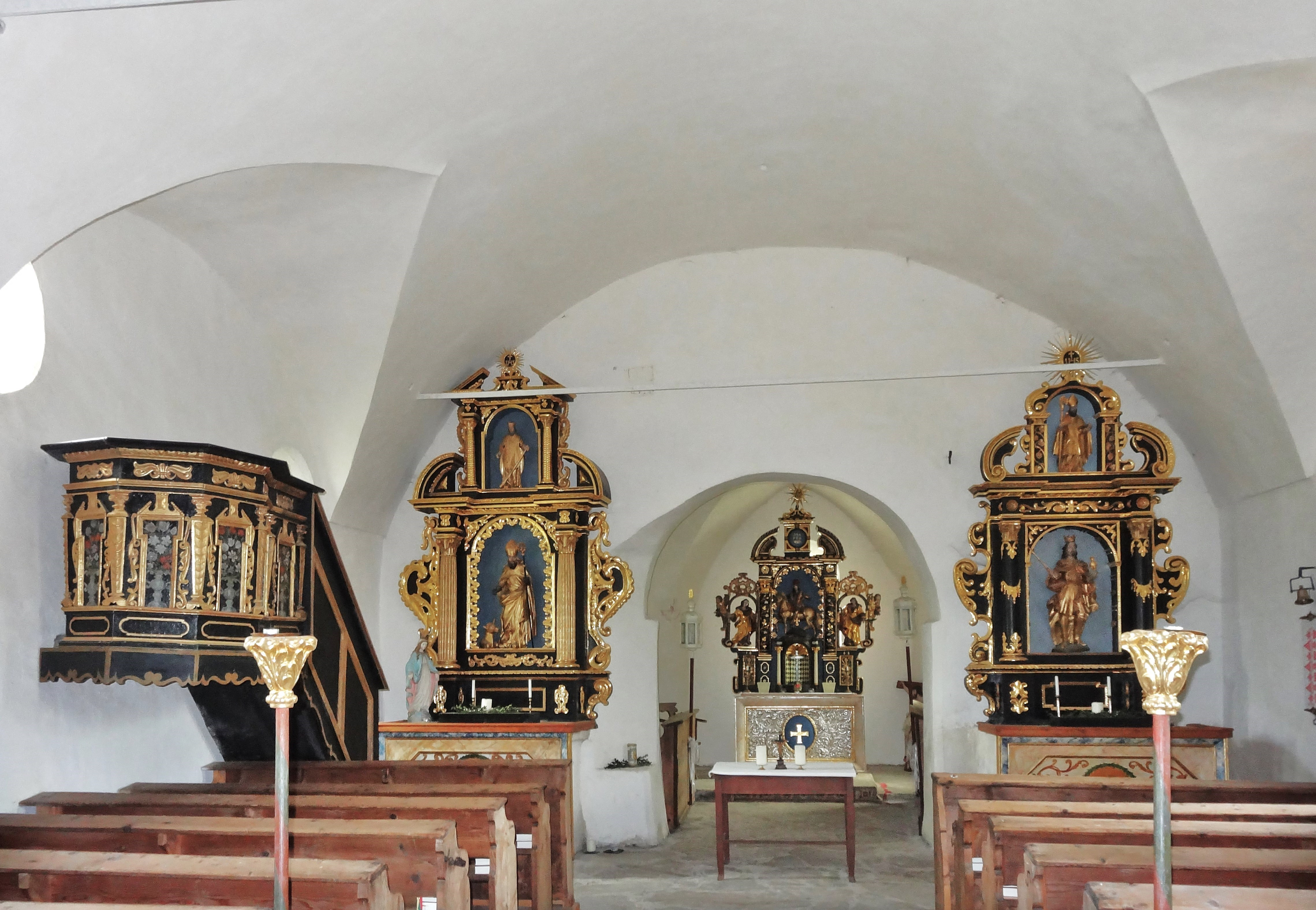 Kath. Filialkirche St. Martin (Launsdorf), Innenansicht